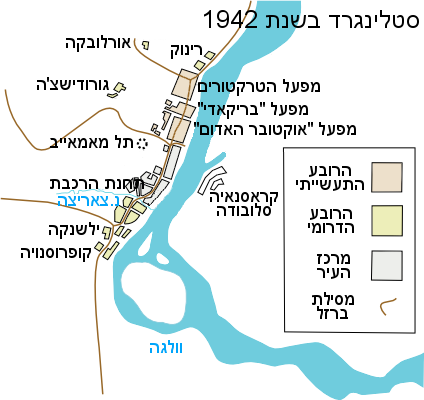 stalingrad in 1942